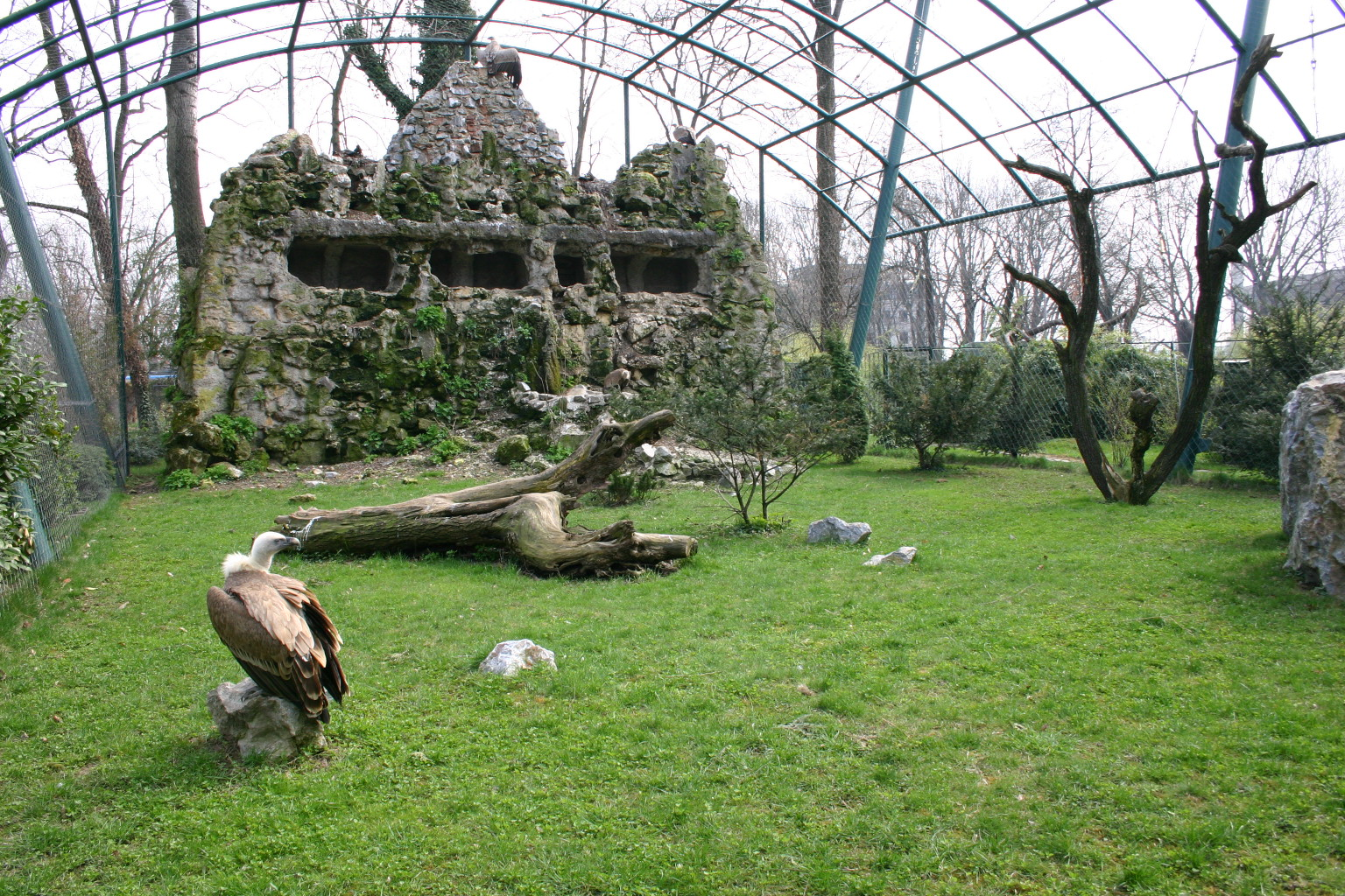 Zoo Zagreb-nastamba za bjeloglave supove